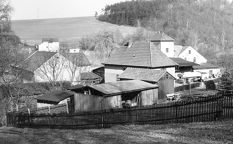 Original image description from the Deutsche FotothekTriebischtal-Tanneberg. Dammmühle